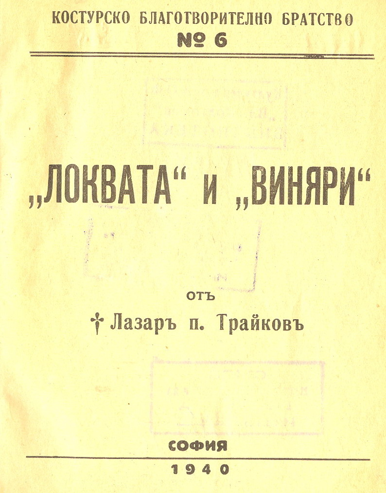 Корица на Локвата и Виняри на Лазар Поптрайков.